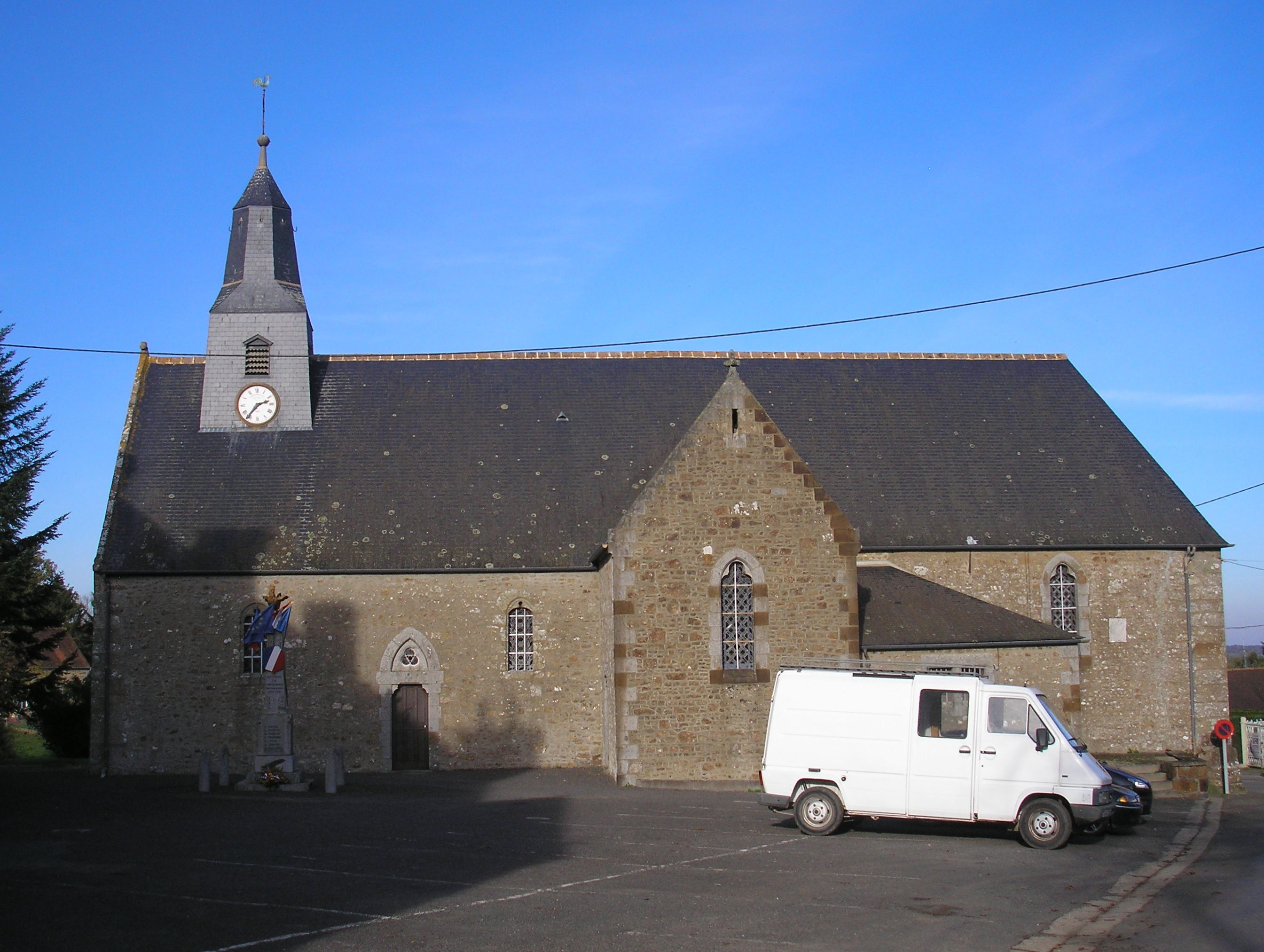 Saint-Martin-l'Aiguillon (Normandie, France). L'église Saint-Martin.